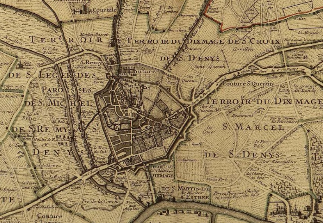 Plan partiel tiré du plan du terroir de St Denis en France et des paroisses alentours comprenant le terroir de Saint-Denis (93)